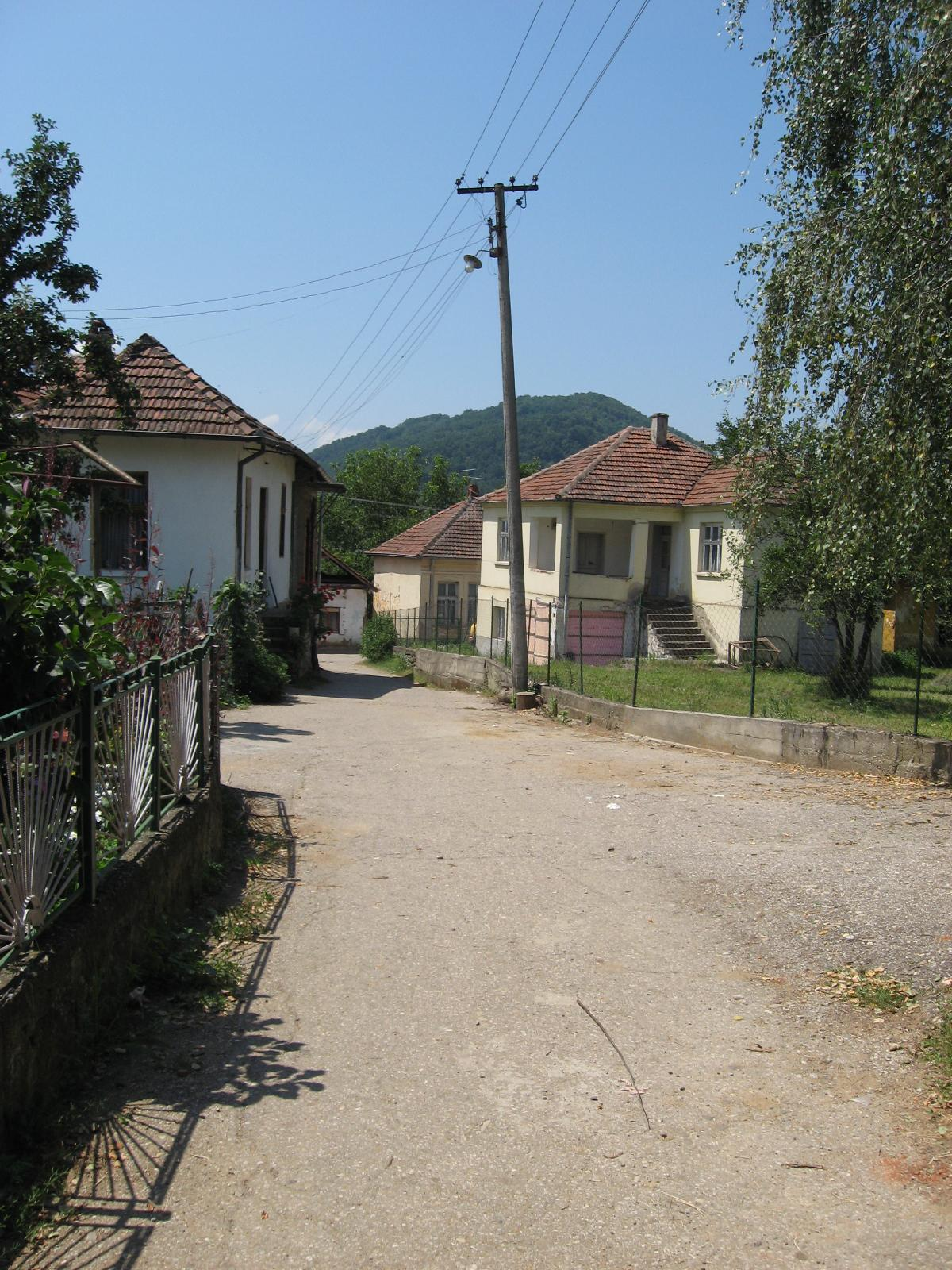 Sopstvena slika sela Dadince uličica prema centru sela Dragan Cvetkovic juli 2010